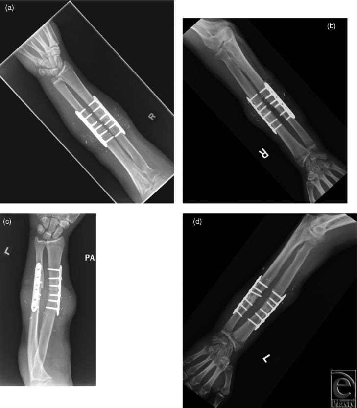 Röntgenaufnahme beider Hände von vorne einen (a,c) und neun (b,d) Monate nach einer Handtransplantation